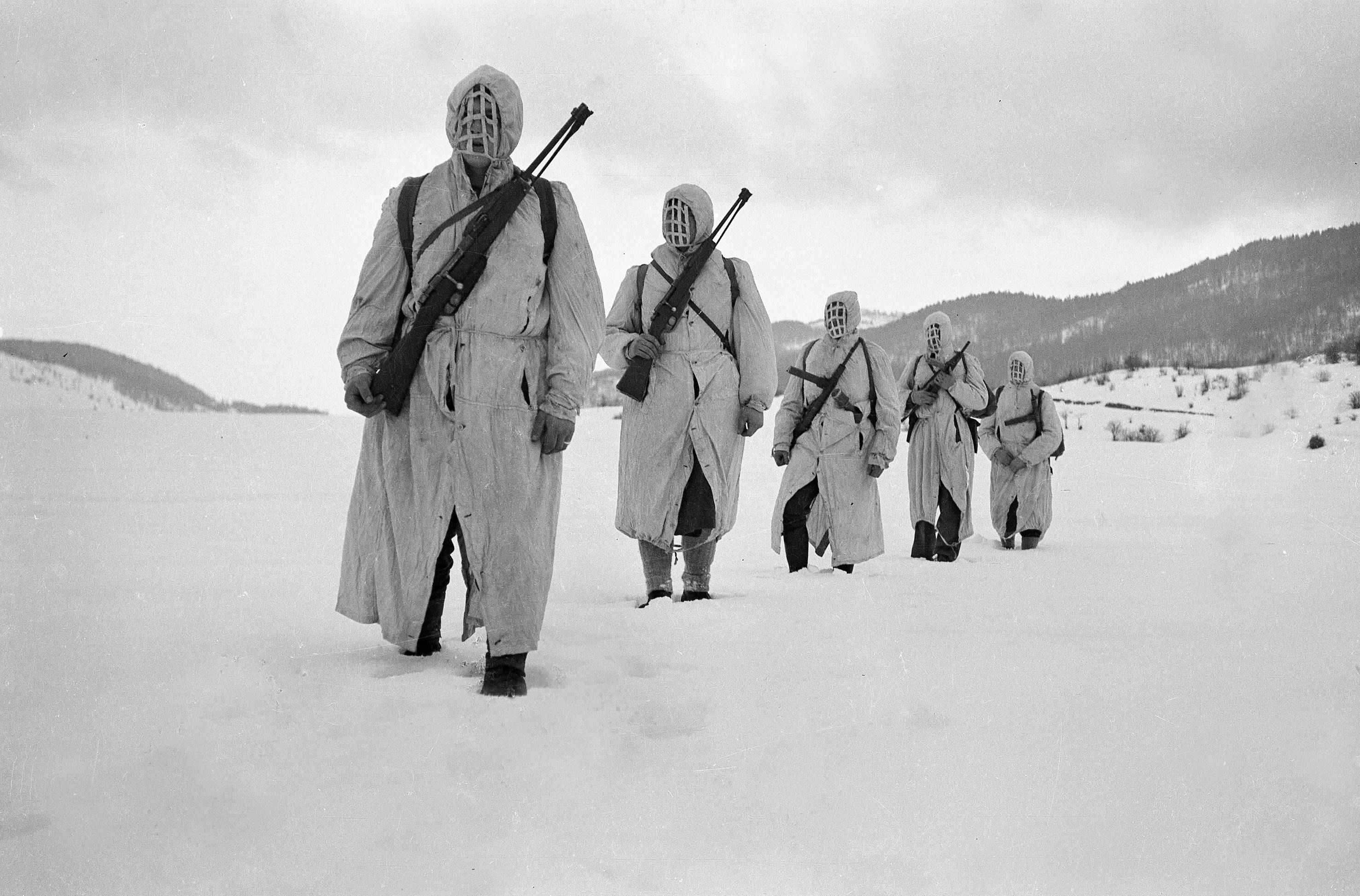 Partizanska patrola kurirjev Notranjskega odreda v belem odhaja na pot v snegu.